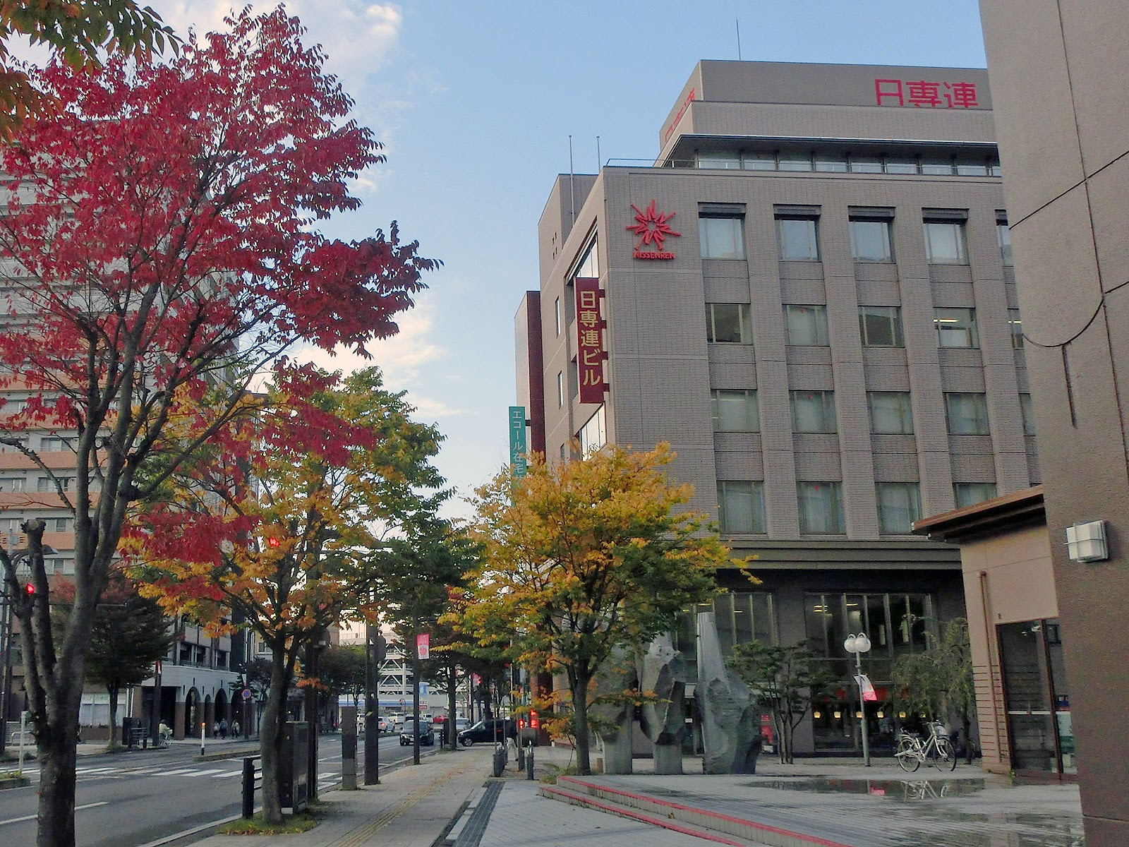 青森県弘前市駅前町の様子。